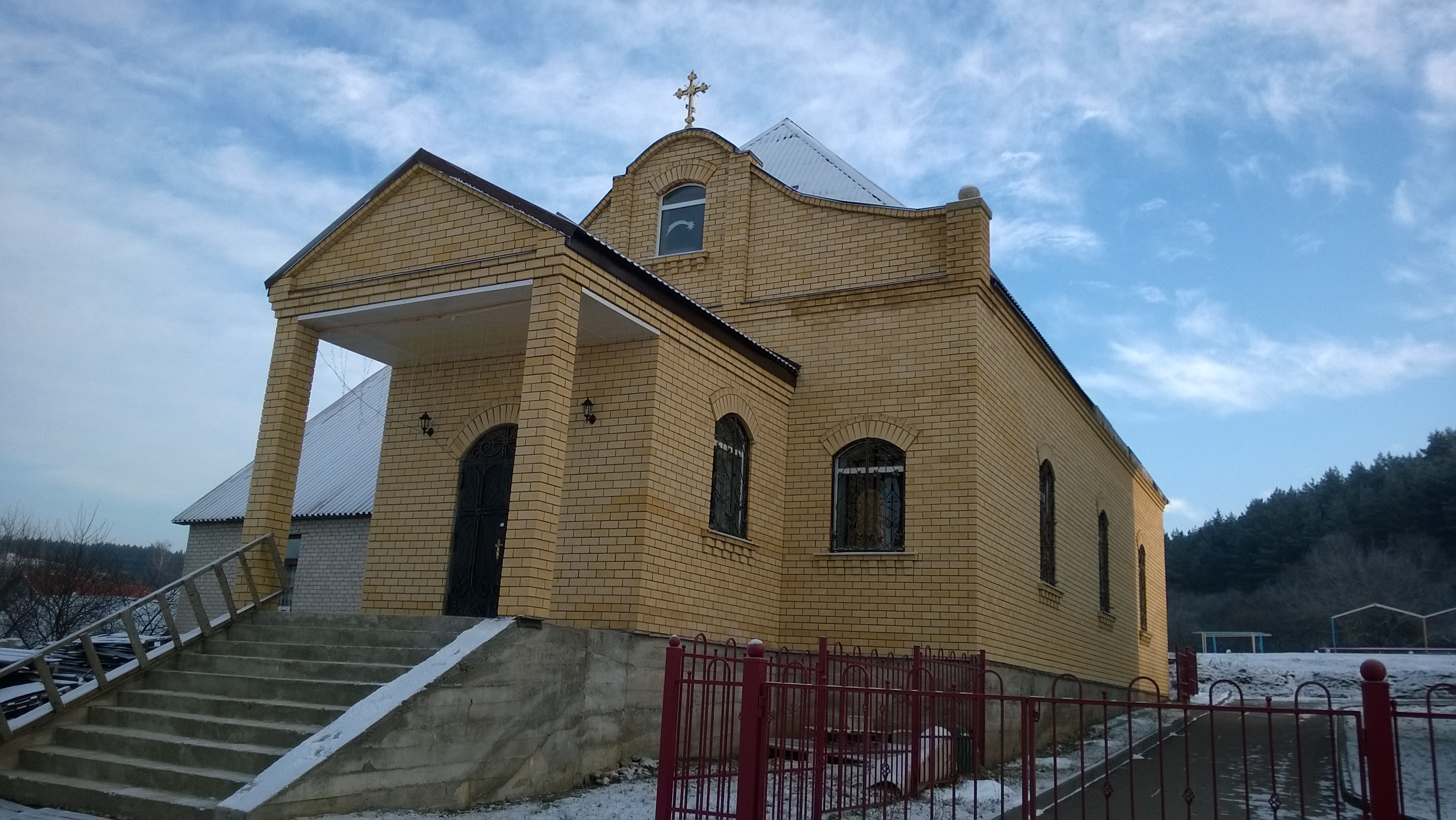 Sapockin, Belarus